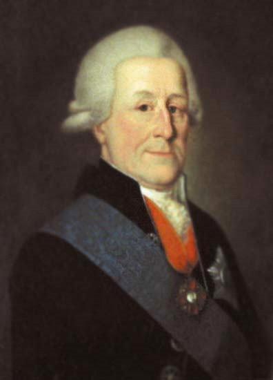 Неизвестный художник XIX века Портрет графа Ф.А. Остермана XIX в. Х., м. 70,0х60,0 Музей-усадьба Ф.И. Тютчева "Мураново". Лит.: Благой Д.Д. Мураново (литературная экскурсия).- М., 1925.- С. 12.